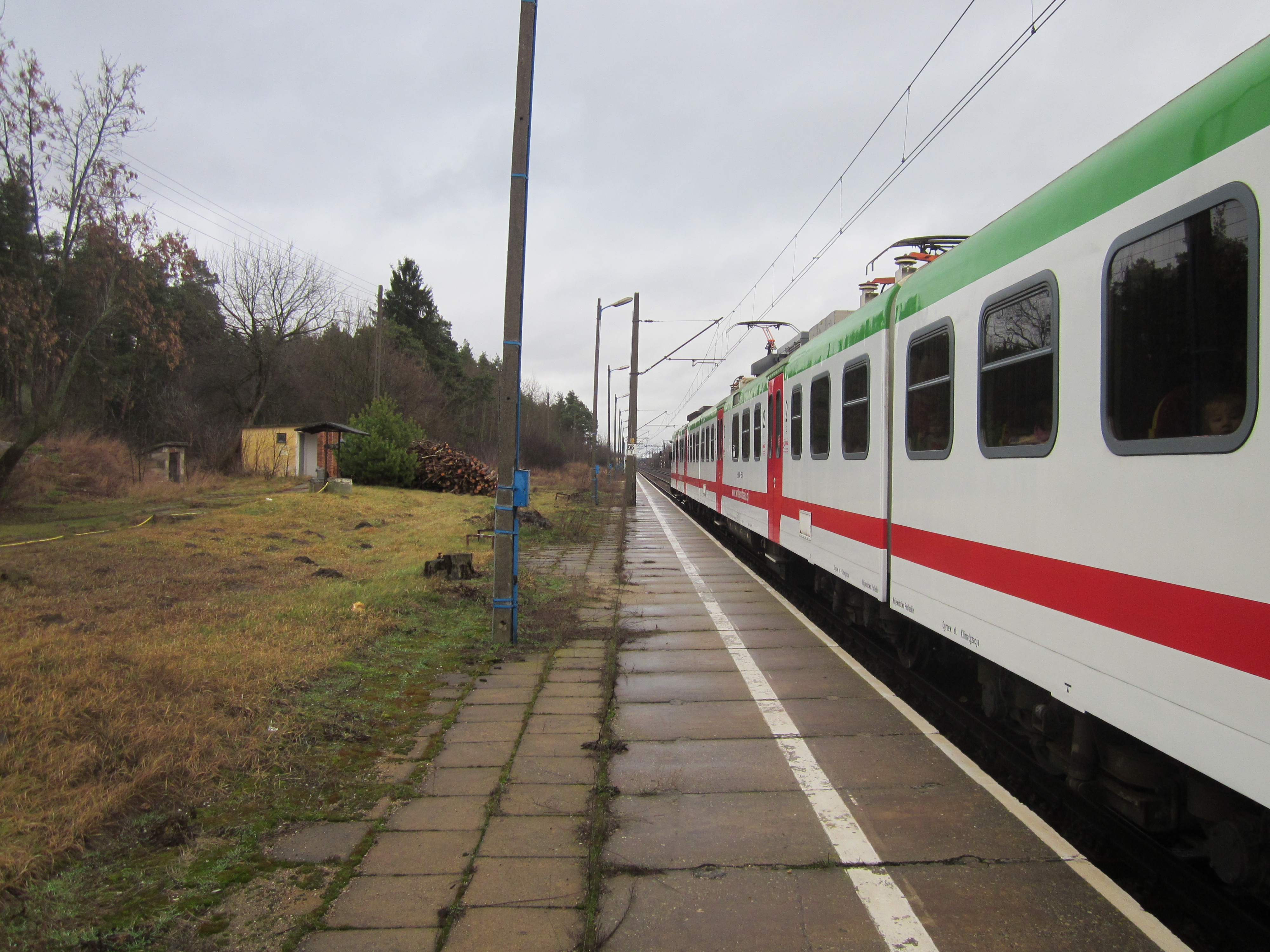 Zdjęcie zostało zrobione 12 stycznia 2014 roku podczas 22 finału WOŚP – przejazd specjalnym pociągiem WOŚP na trasie Szepietowo – Czyżew – Małkinia – Czyżew – Szepietowo.